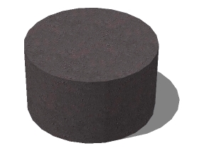 3D-Modell Marshallkörper